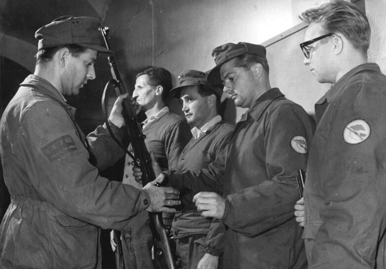 ADN-ZB-Stöhr-24.8.1961-Berlin: Kampfgruppen während ihres Einsatzes zur Durchsetzung der Grenzsicherungsmaßnahmen der DDR vom 13.8.1961. - Waffenkontrolle.